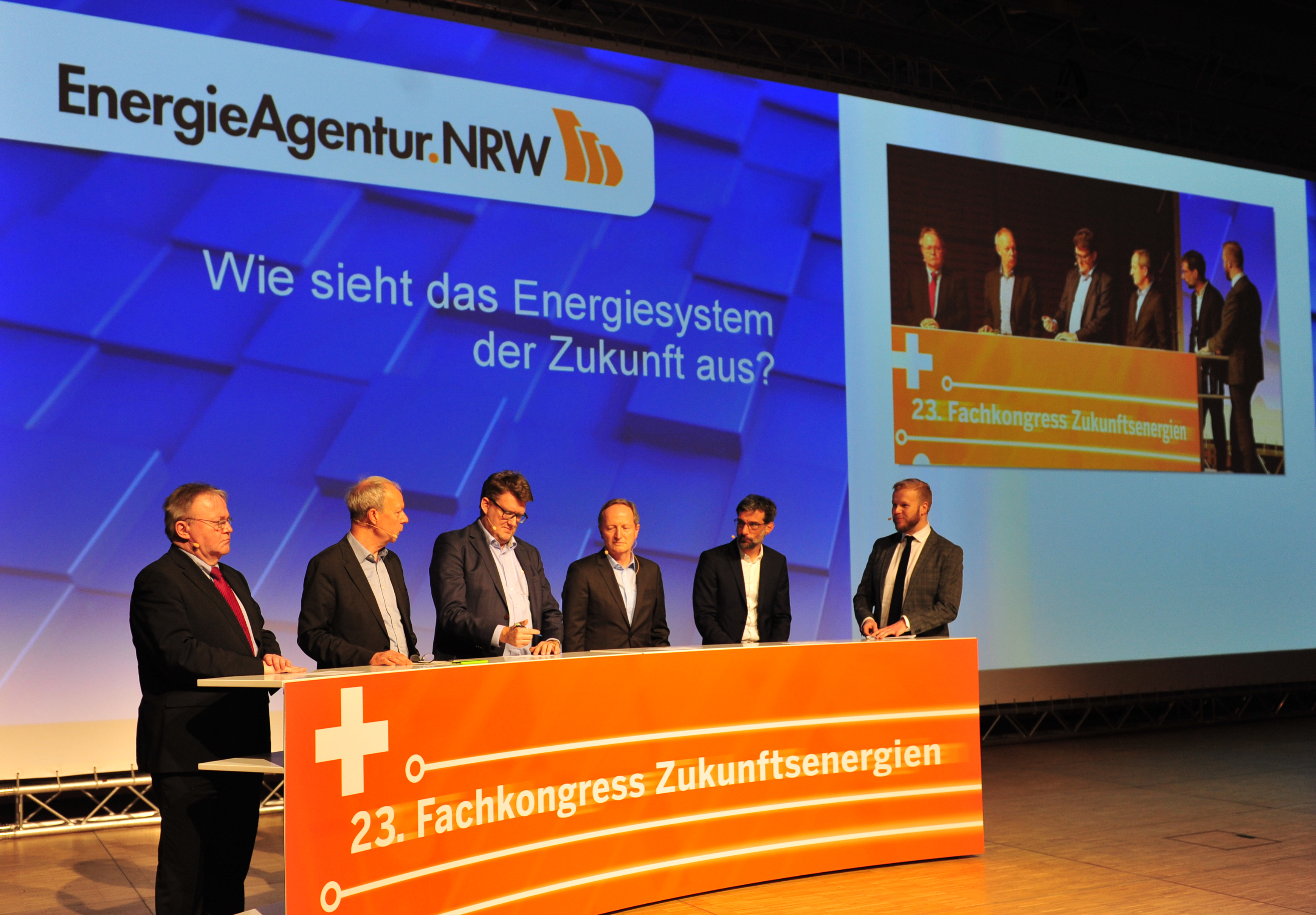 Die EnergieAgentur.NRW hat heute (5.2.2019) mit dem 23. Fachkongress Zukunftsenergien die Messe E-world energy & water 2019 eröffnet. Der Kongress thematisierte das Energiesystem der Zukunft, die treibhausgasneutrale Industrie sowie Smart Energy Cities. Über 500 Branchenvertreter/innen diskutierten am Eröffnungstag in einem prominent besetzten Plenum am Vormittag und drei Fachforen am Nachmittag über die Herausforderungen und Chancen dieses Transformationsprozesses. Das Bild ist zur Nutzung und Weitergabe frei. Beleg erbeten an . Foto: EnergieAgentur.NRW, Klaus Voit